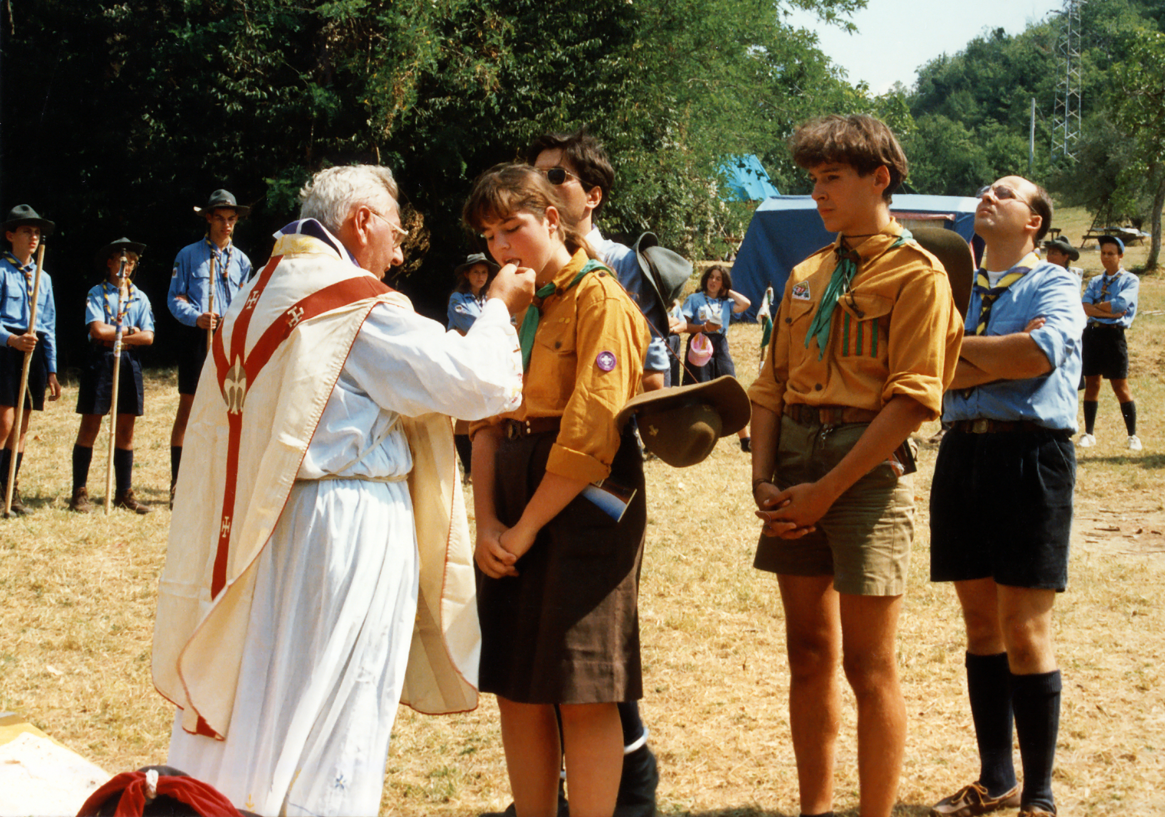 Internationales Sommerlager „Interexplo Italia ’93 – The Spirit of B.P.”, das vom 09.08. bis 22.08.1993 auf dem Gelände der Associazione Guide e Scouts Cattolici Italiani (AGESCI) „Padre Ugo Berruto“ der Gruppen La Spezia 2 und 5 bei Arlia/Fivizzano, Toscana, stattfand. Organisiert hatten das Lager die Pfadfinder des Stammes Ägypten, Trupp Penzberg der Katholischen Pfadfinderschaft Europas (KPE) sowie AGESCI-Pfadfinder aus La Spezia. Als weitere Gäste wurden die Pfadfinder der mit den Penzbergern befreundeten 73. Abteilung „Weißer Hirsch“ des ungarischen Magyar Cserkészszövetség (MCSSZ) aus Tapolca eingeladen. Im Bild: Mundkommunion durch den katholischen Pfarrer der AGESCI-Pfadfinder an eine ungarische Pfadfinderin während des Gottesdienstes am 15. August 1993 (Mariä Himmelfahrt). Wie die Lilie auf dem liturgischen Gewand zeigt, hatte der Priester ehemals der Associazione Scouts Cattolici Italiani angehört, die 1974 in der AGESCI aufging.